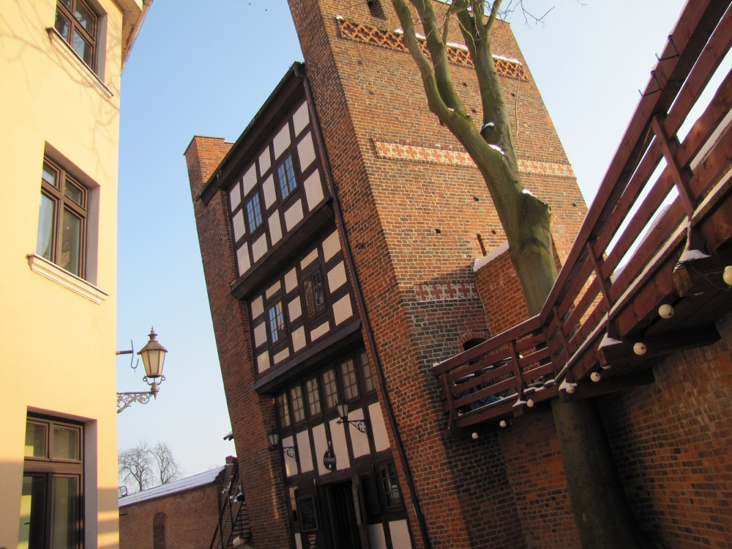 KRZYWA WIEŻA.